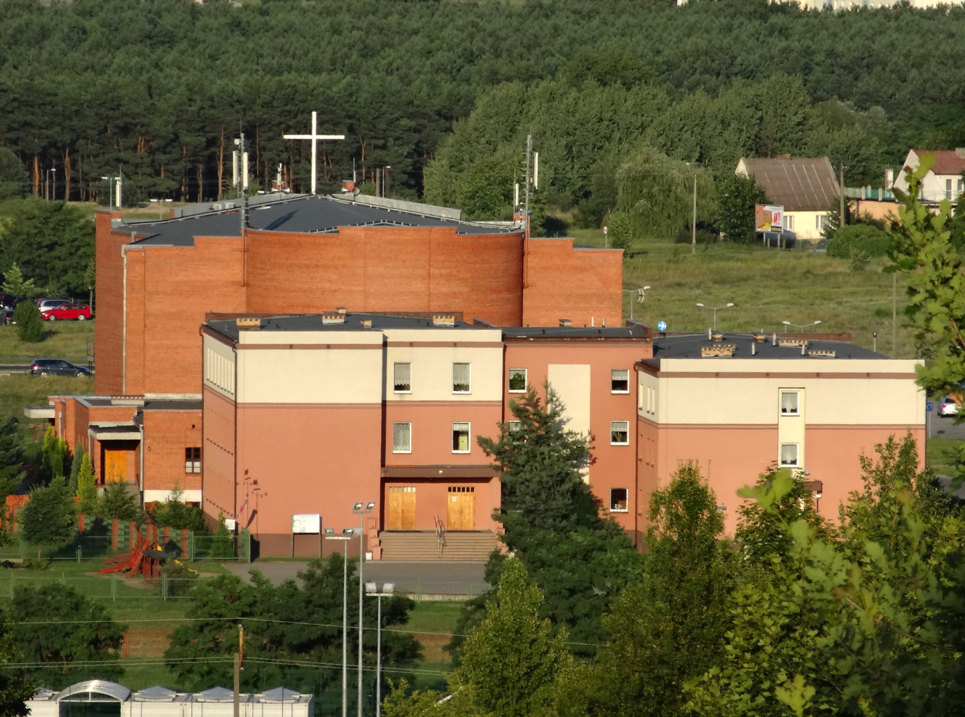 Kościół p.w. św. Marka Ewangelisty w Bydgoszczy-Fordonie - widok ze Zbocza Fordońskiego